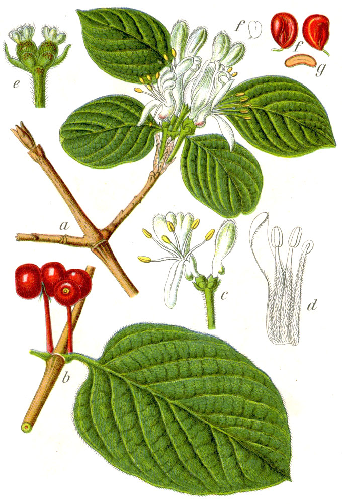 Lonicera xylosteum L. Original Caption Gemeine Heckenkirsche, Lonicera xylosteum